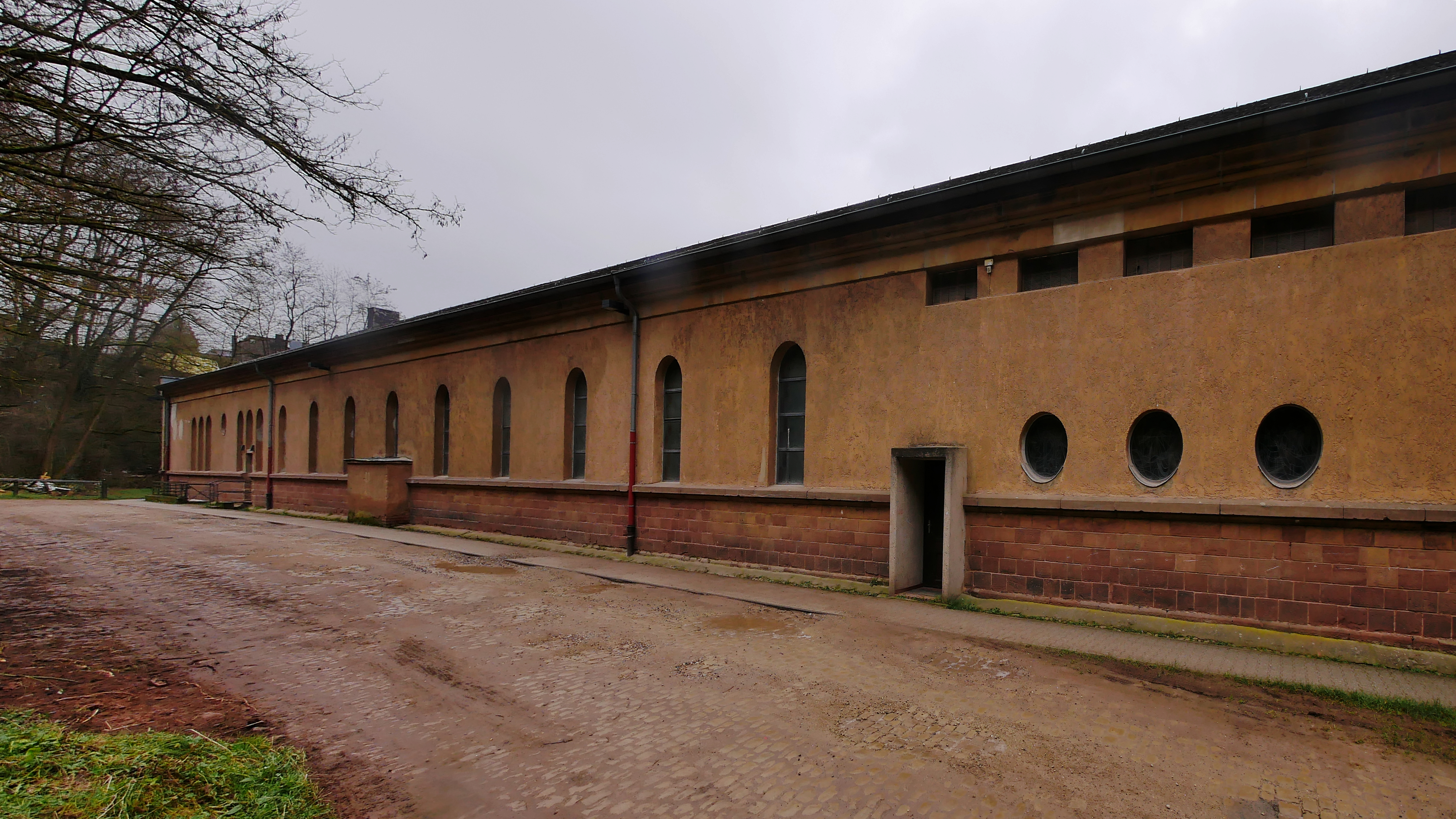 Trier, Pfarrkirche Christkönig in Trier-West. Ehemals die Exerzier- und Reithalle der Horn-Kaserne